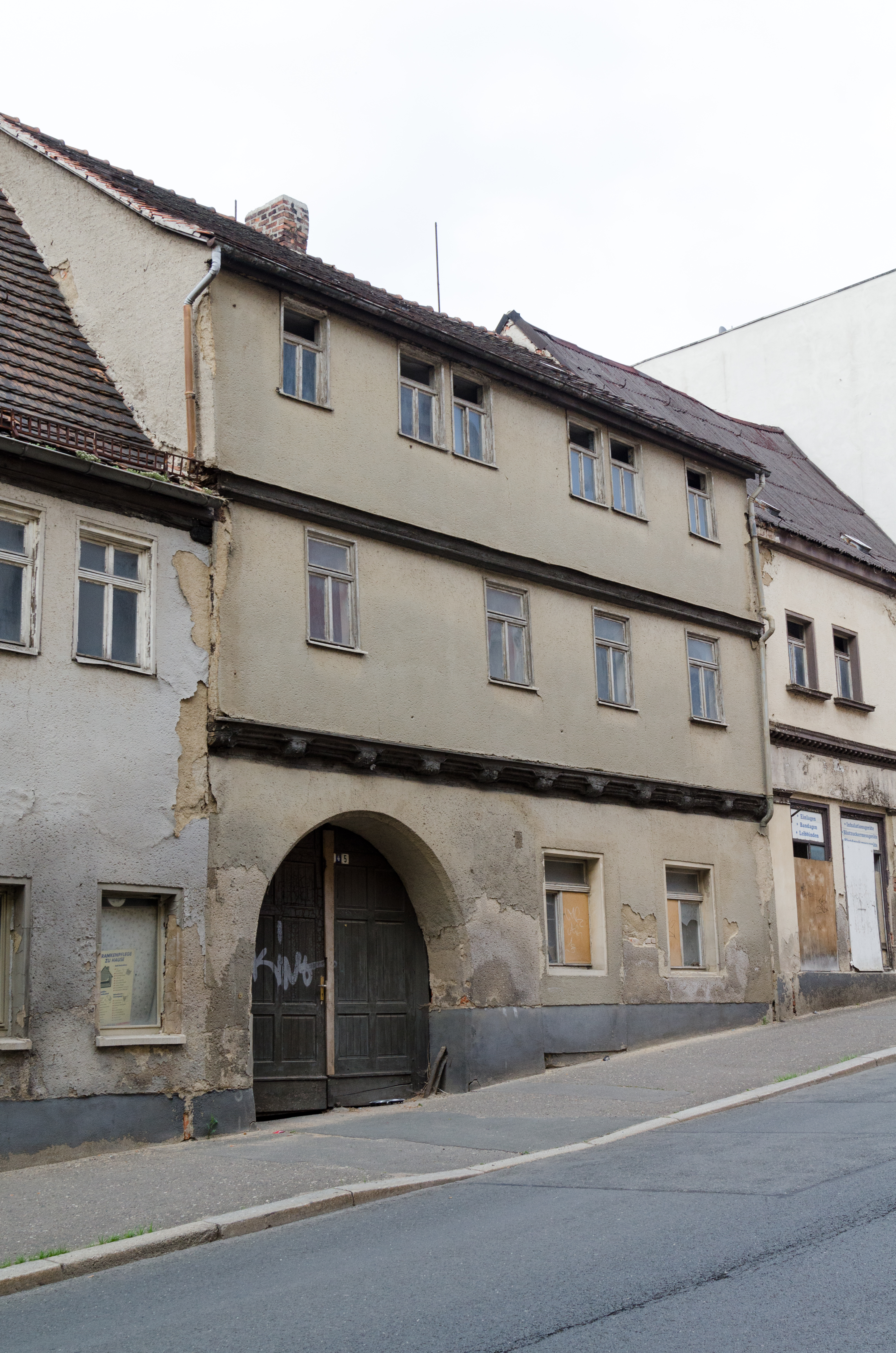 Zeitz, Rahnestraße 4